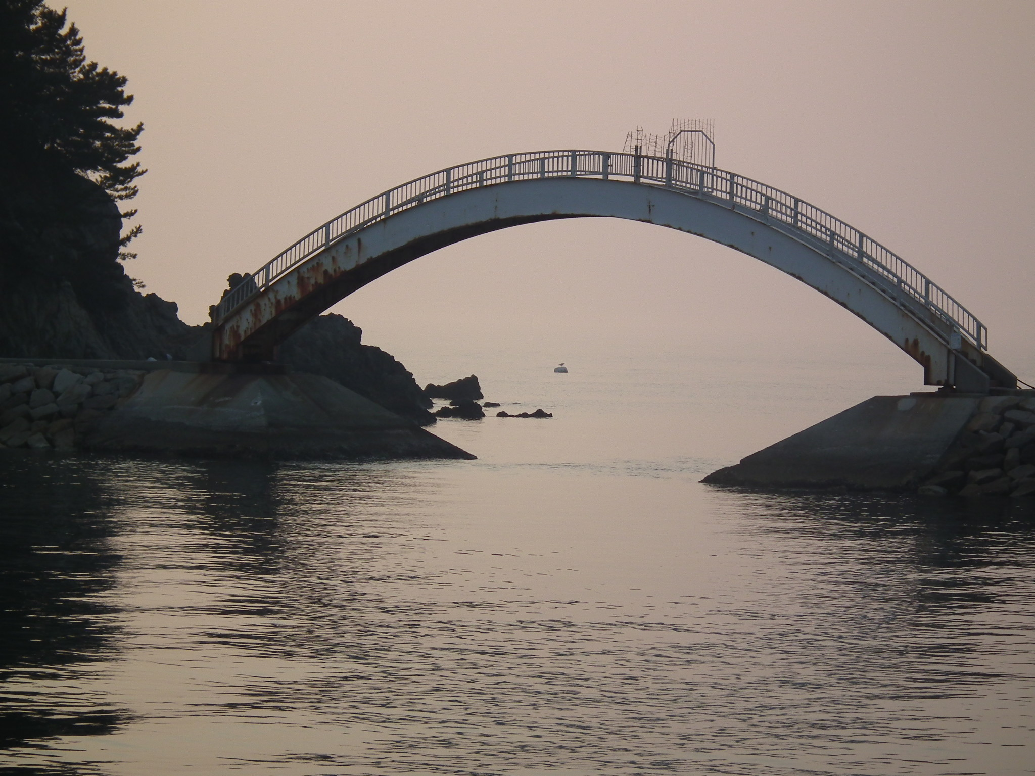 Benten-island MinamiAwaji-city 弁天島南あわじ市